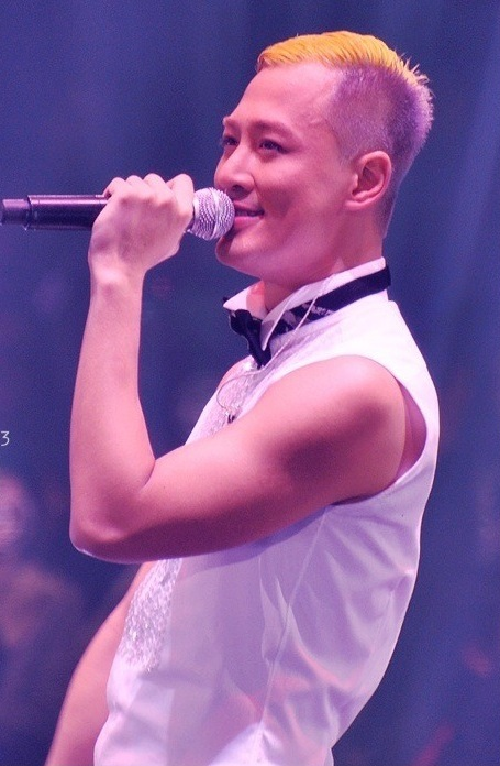 中文（香港）: 2013年A Time 4 You 演唱會上自拍照片